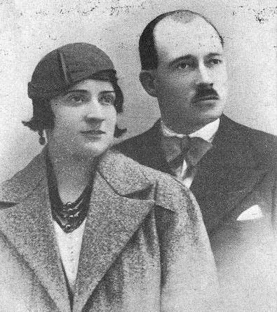 Alejandro Porto Leis coa súa muller na voda, fotografía en Vida Gallega 1934